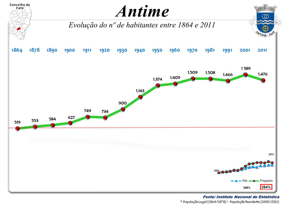 Censos 1864/2011